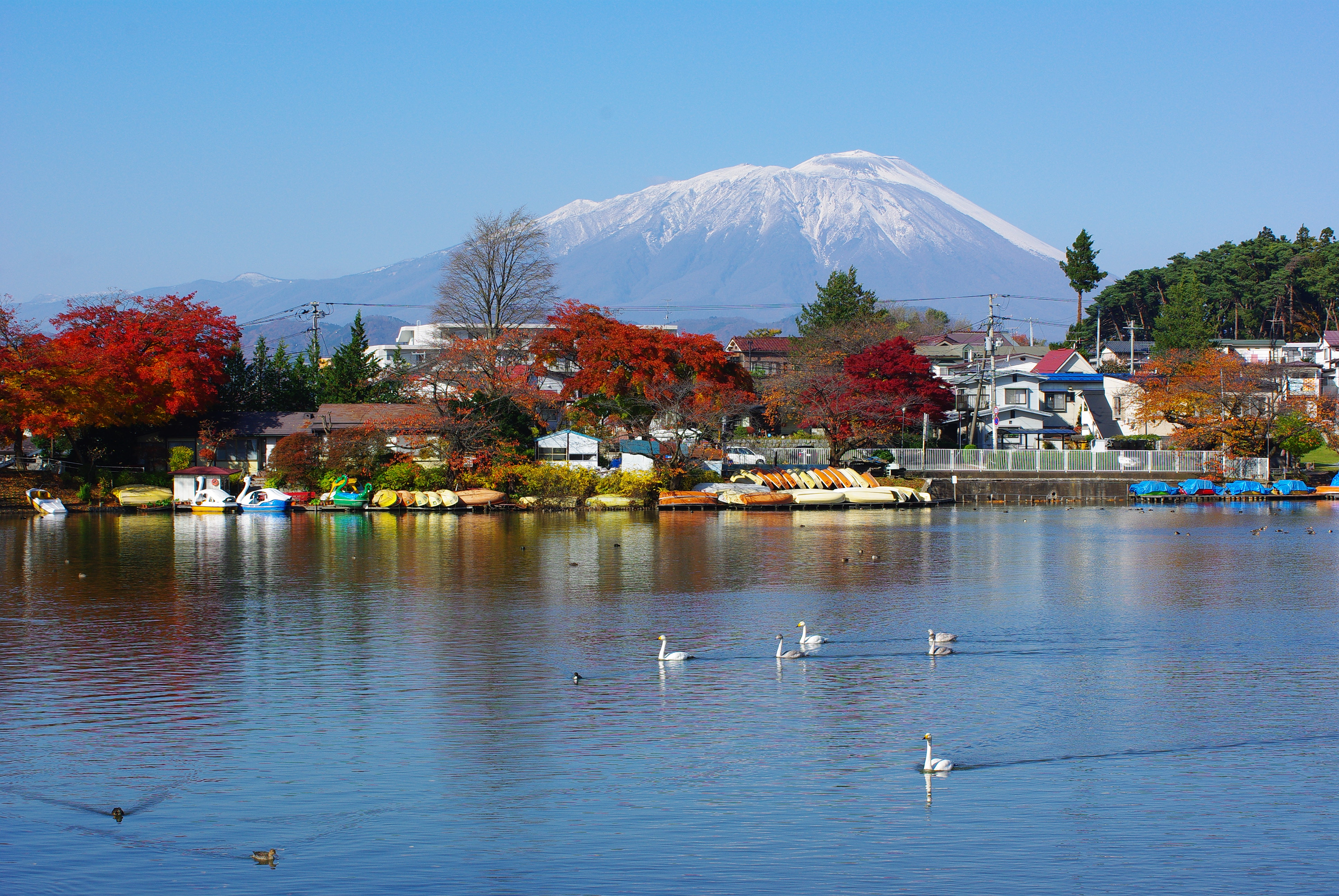 高松の池と岩手山 Takamatsu-no-Ike Pond & Mt. Iwate